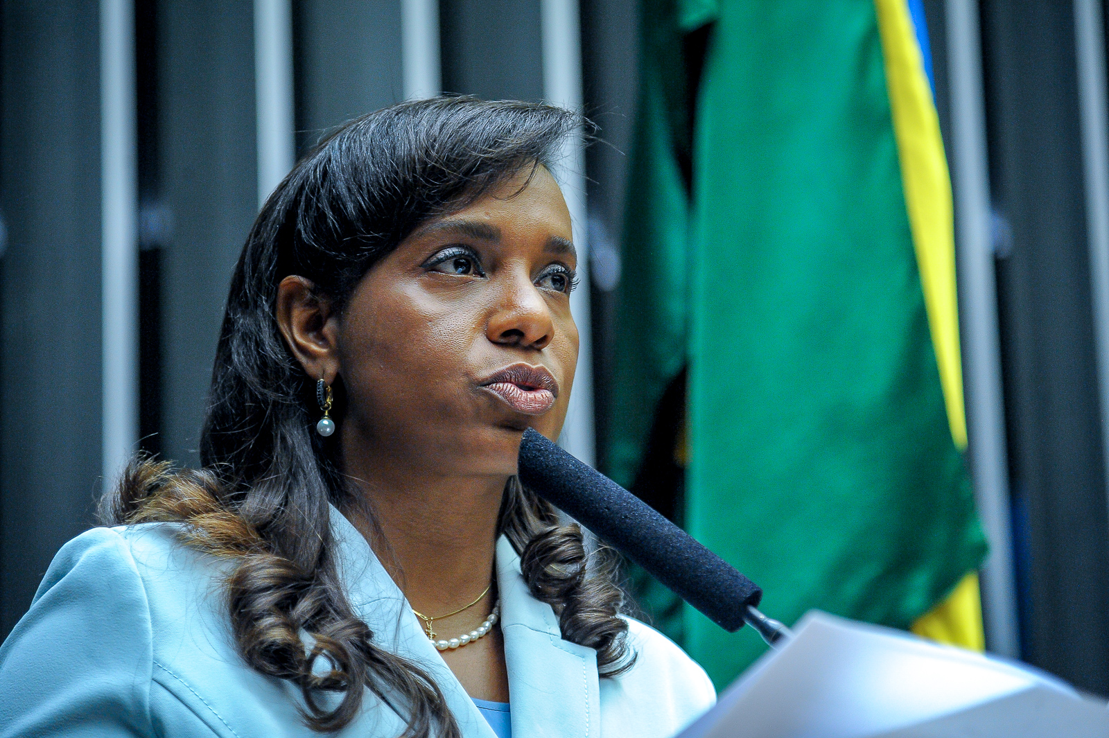 Sessão Solene em homenagem à criação do Estado de Israel, realizada pela Câmara dos Deputado. 19 de maio de 2016